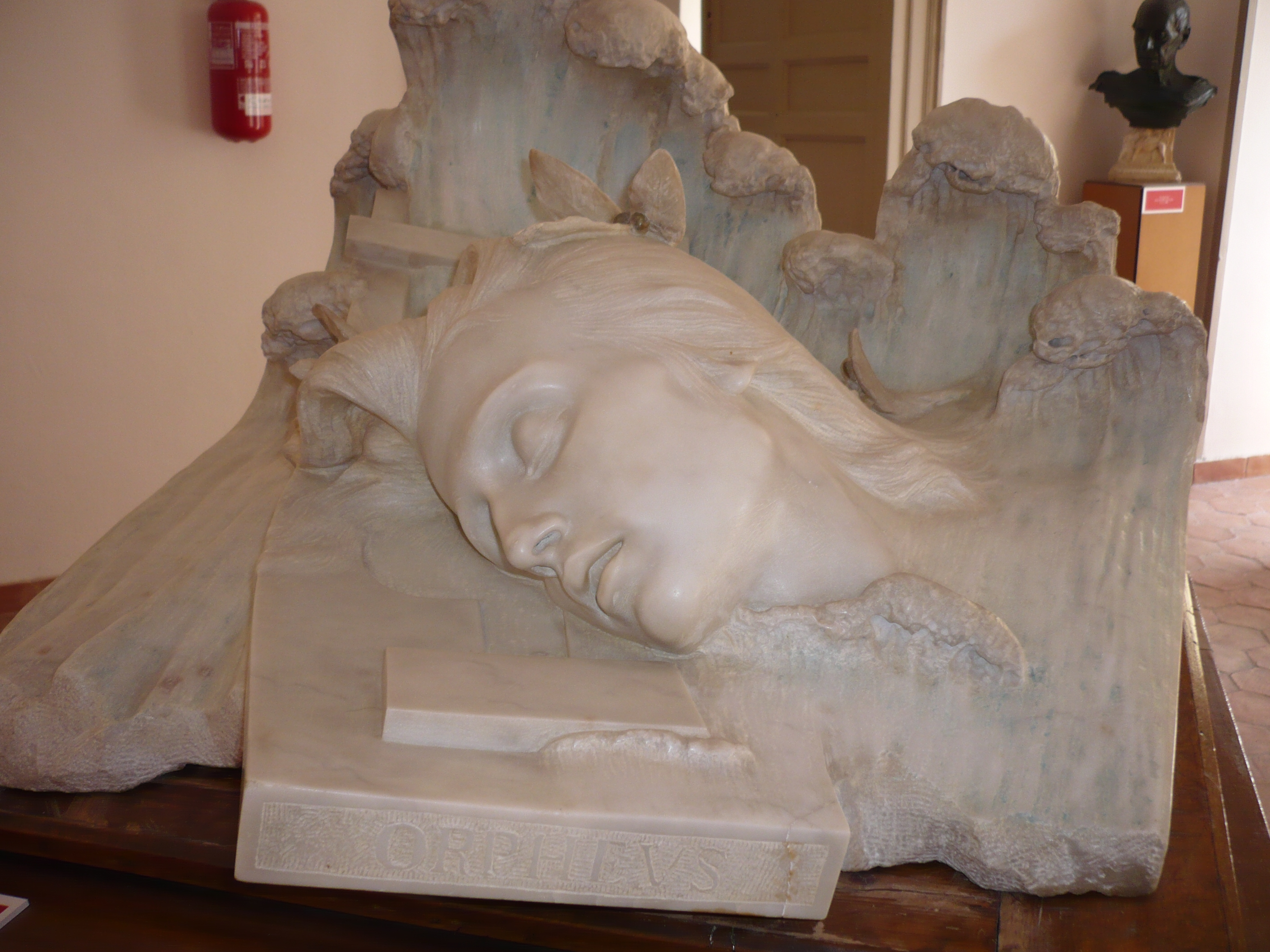 L'Orfeo in marmo ,del 1898, di Michele Tripisciano (1860-1913), esposto nel Museo Tripisciano di Palazzo Moncada di Caltanissetta; vista frontale con basamento in legno.